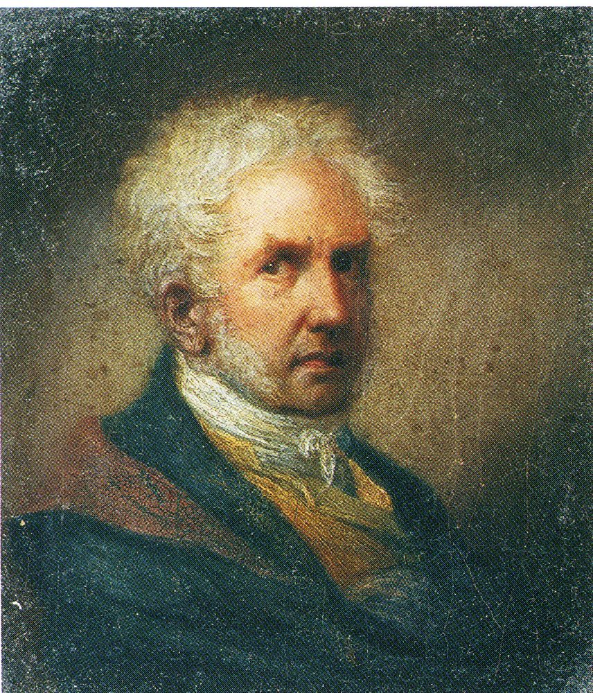 Self-portrait